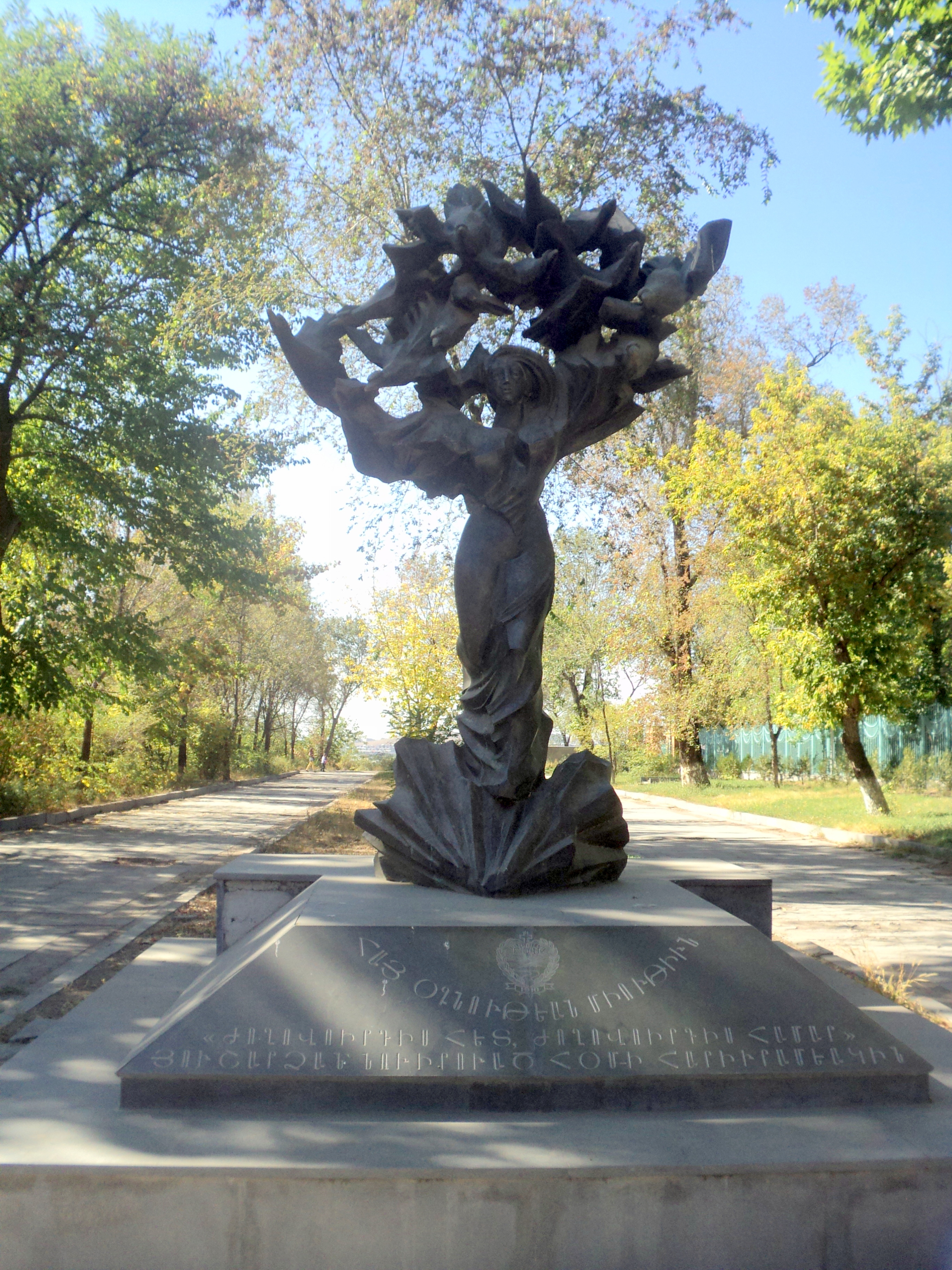 Քանդակագործ` Գևորգ Գևորգյան